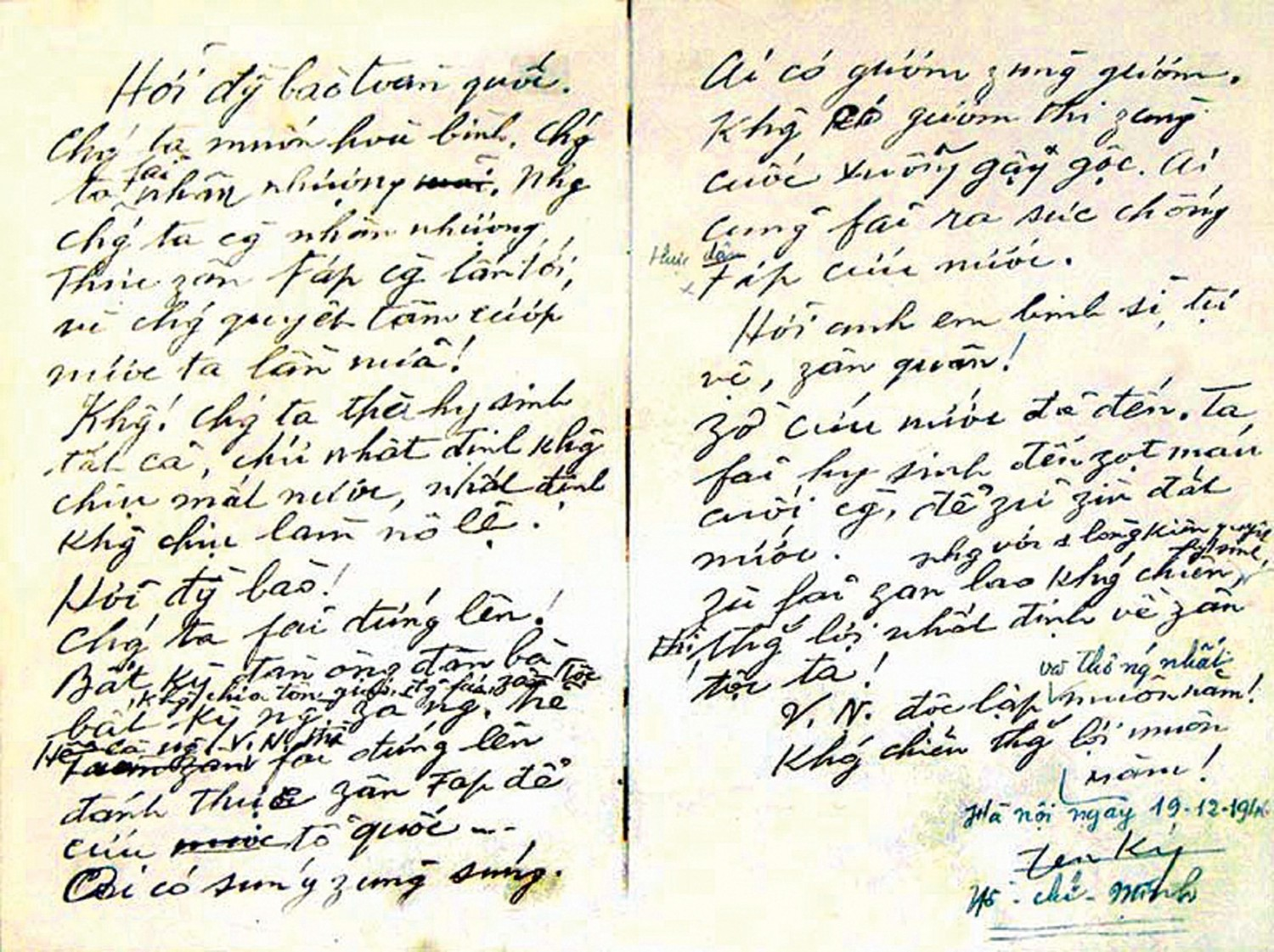 Văn-bản viết-tay Lời hiệu-triệu Toàn-quốc Kháng-chiến ngày 19 tháng 12 năm 1946 của Hồ-chí-Minh.